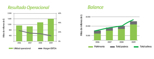 Cifras-Claves-Grupo-EPM-1